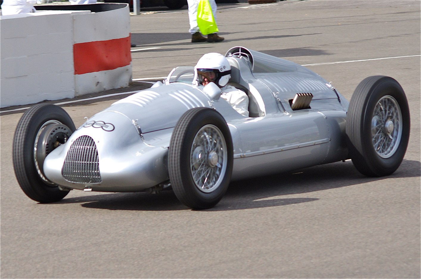 Goodwood Revival 2012